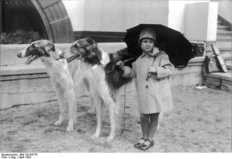 Die Eröffnung der großen Rassehunde-Ausstellung im Lunapark in Berlin! Gezeigt wurden erstklassige deutsche Zuchterfolge aller Rassen. Eine kleine Besitzerin mit preisgekrönten Barsois, russischen Windhunden.